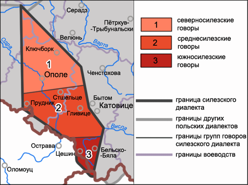 Карта распространения силезских говоров согласно исследованиям К. Нича. С использованием данных, опубликованных на сайте Pod redakcją Haliny Karaś: Opis dialektów polskich. Dialekt śląski. Dialektologia Polska. Dialekty i gwary polskie. Kompendium internetowe